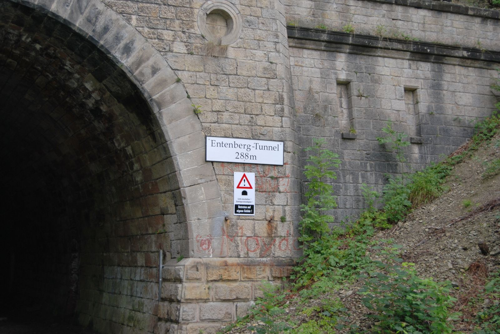 Tafel am Eingang des Entenberg-Tunnels.